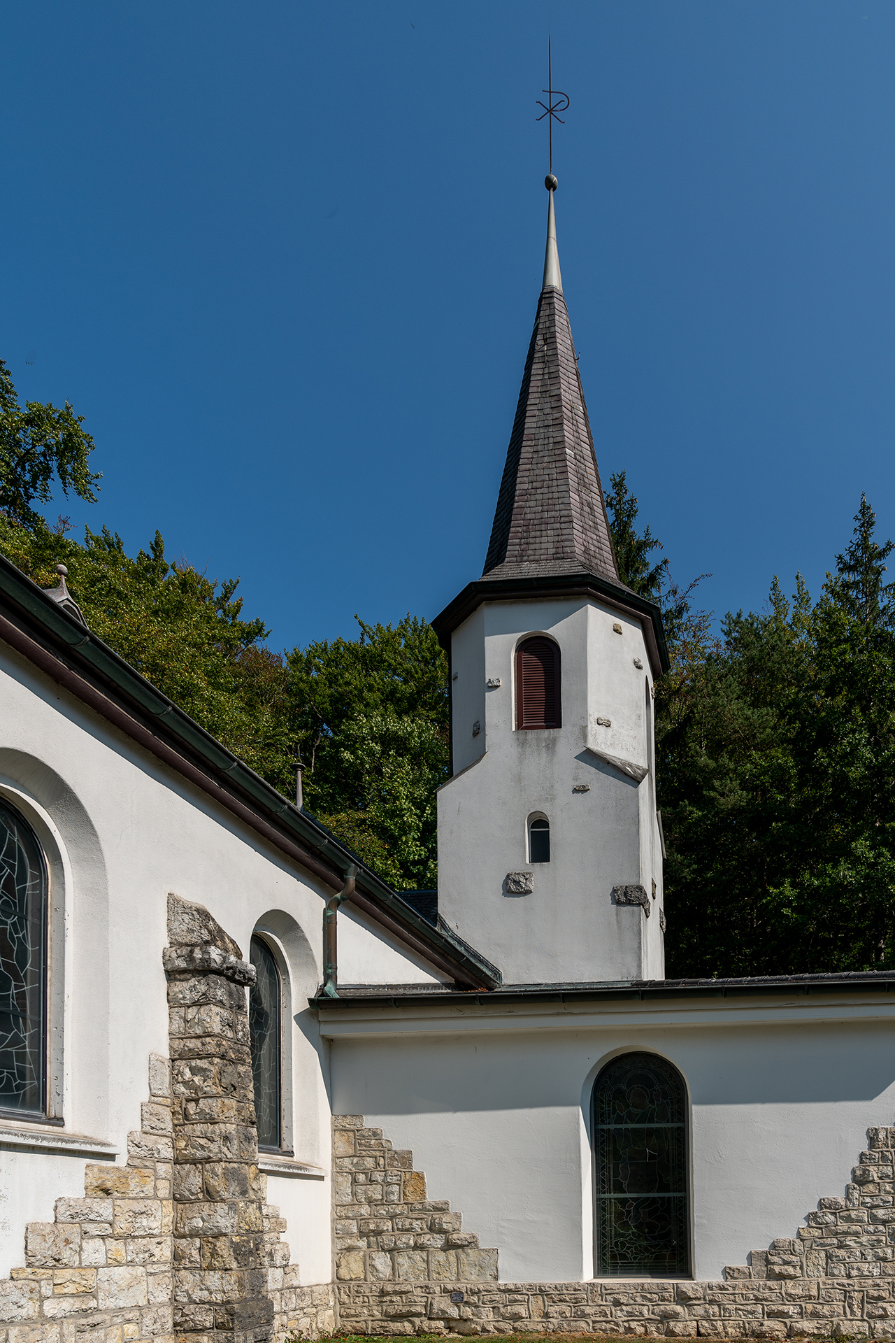 Katholische Kirche in Péry (BE)